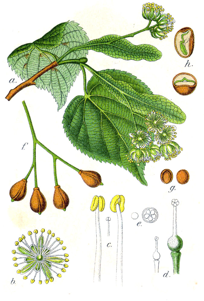 Tilia cordata Mill. Original Caption Winterlinde, Tilia cordata